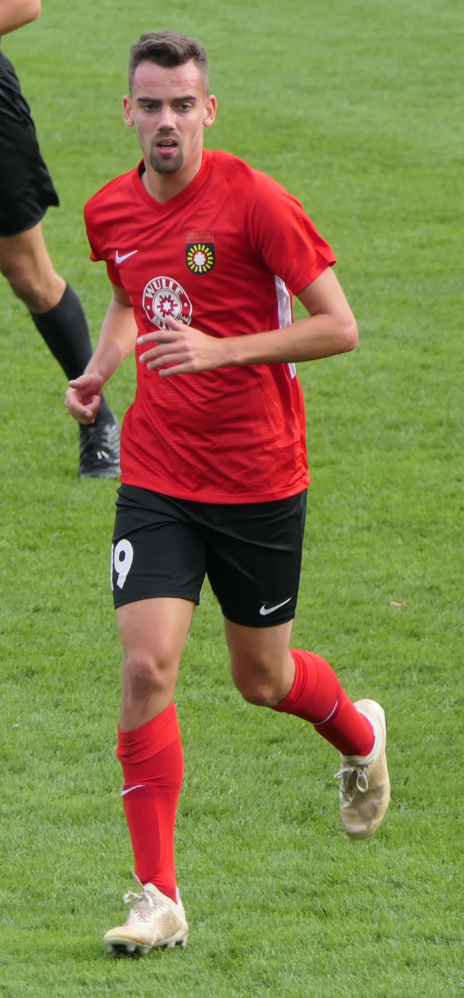 Der Fussballprofi Marco Hingerl im Trikot der SG Sonnenhof Großaspach beim Heimspiel gegen Eintracht Braunschweig am 27.10.2019.